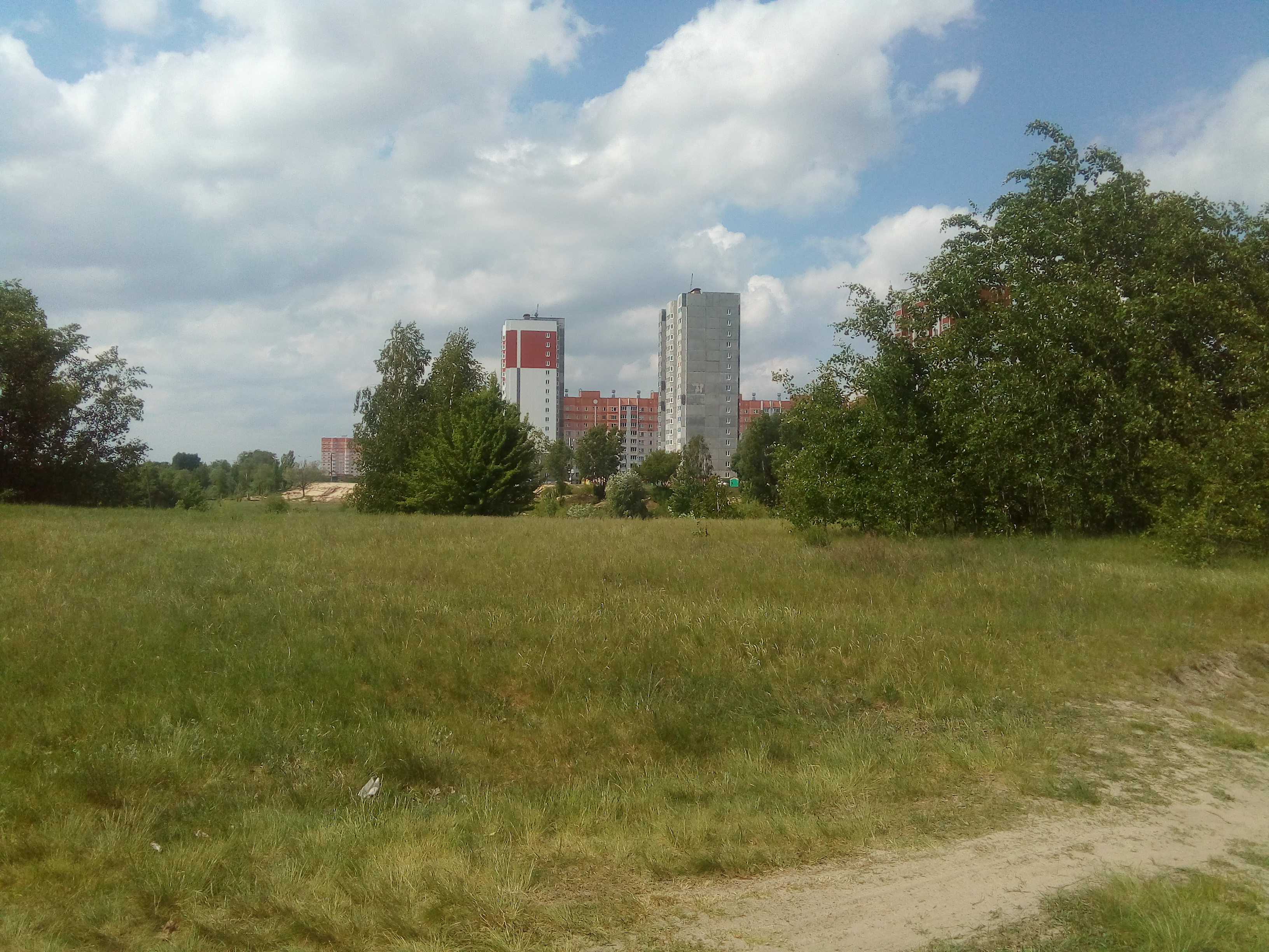 Гарадзішча ранняга жалезнага века "Шведская горка", навакольны від з паверхні гарадзішча.